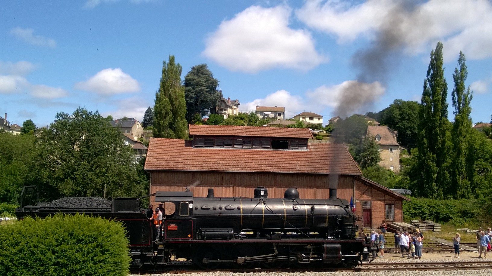 Locomotive à vapeur 140 C 38 en gare d'Eymoutiers-Vassiviere.